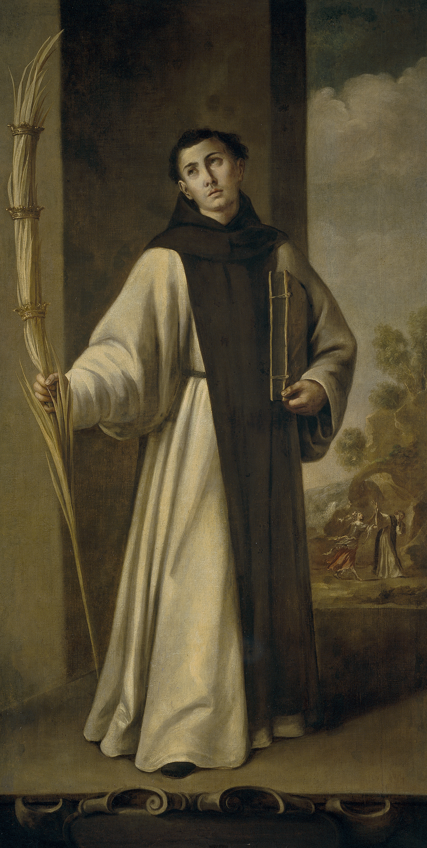 La obra representa a un jóven mártir de la Orden de San Jerónimo, y forma parte de una serie de lienzos que el pintor Juan de Valdés Leal ejecutó para el monasterio de San Jerónimo de Buenavista de Sevilla.